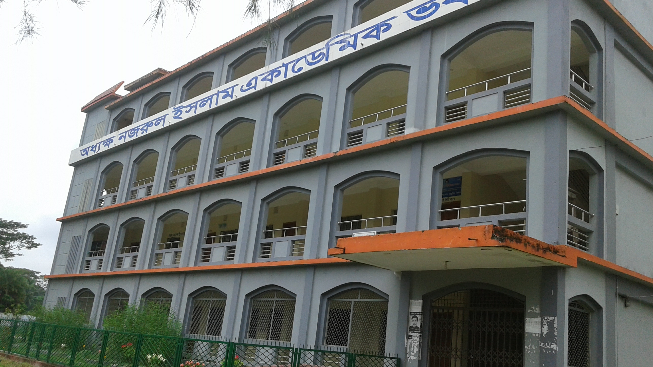 অধক্ষ্য নজরুল ইসলাম একাডেমিক ভবন,চরফ্যাসন সরকারি কলেজ যা মাঠের পশ্চিমে অবস্থিত।